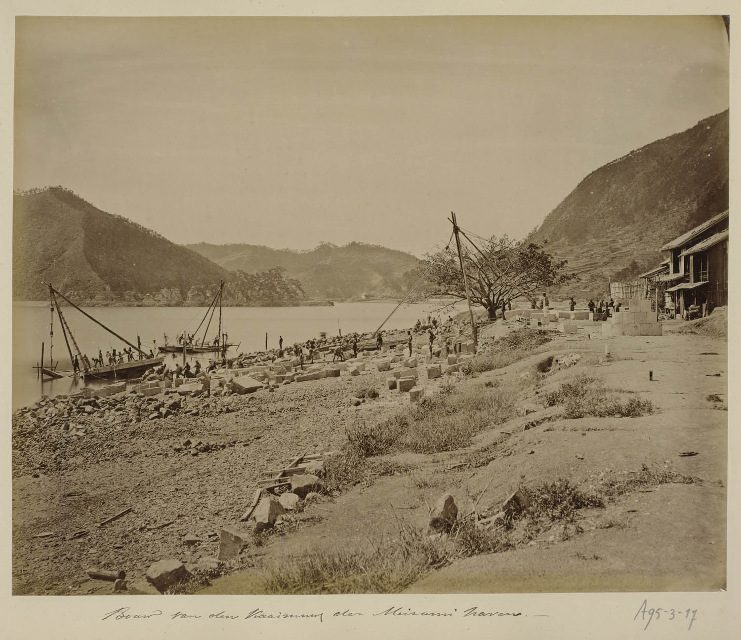 Bouw van den kaaimuur der Misumi havens. Foto van voor 1890